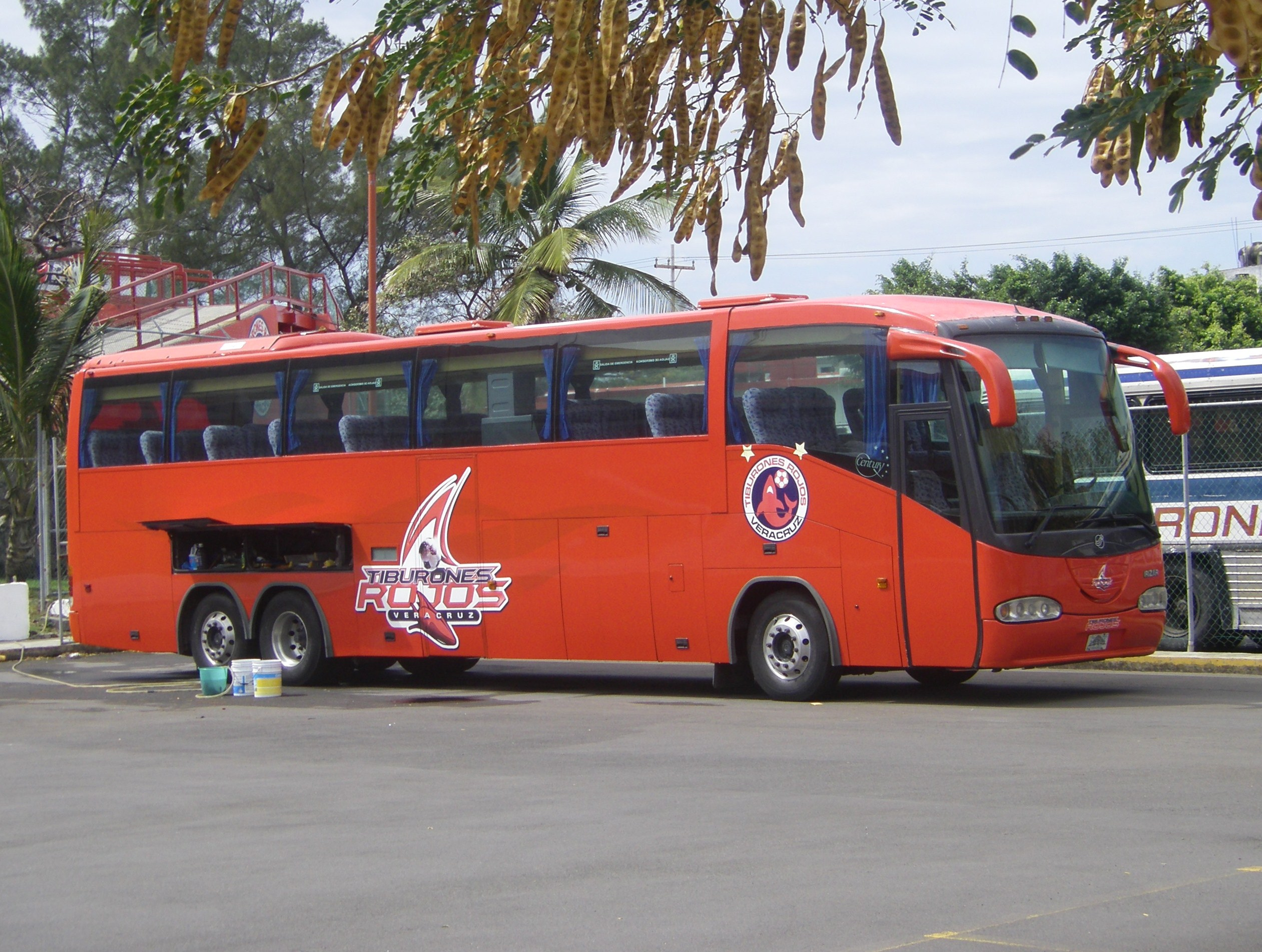 Mannschaftsbus des Fußballteams aus Veracruz